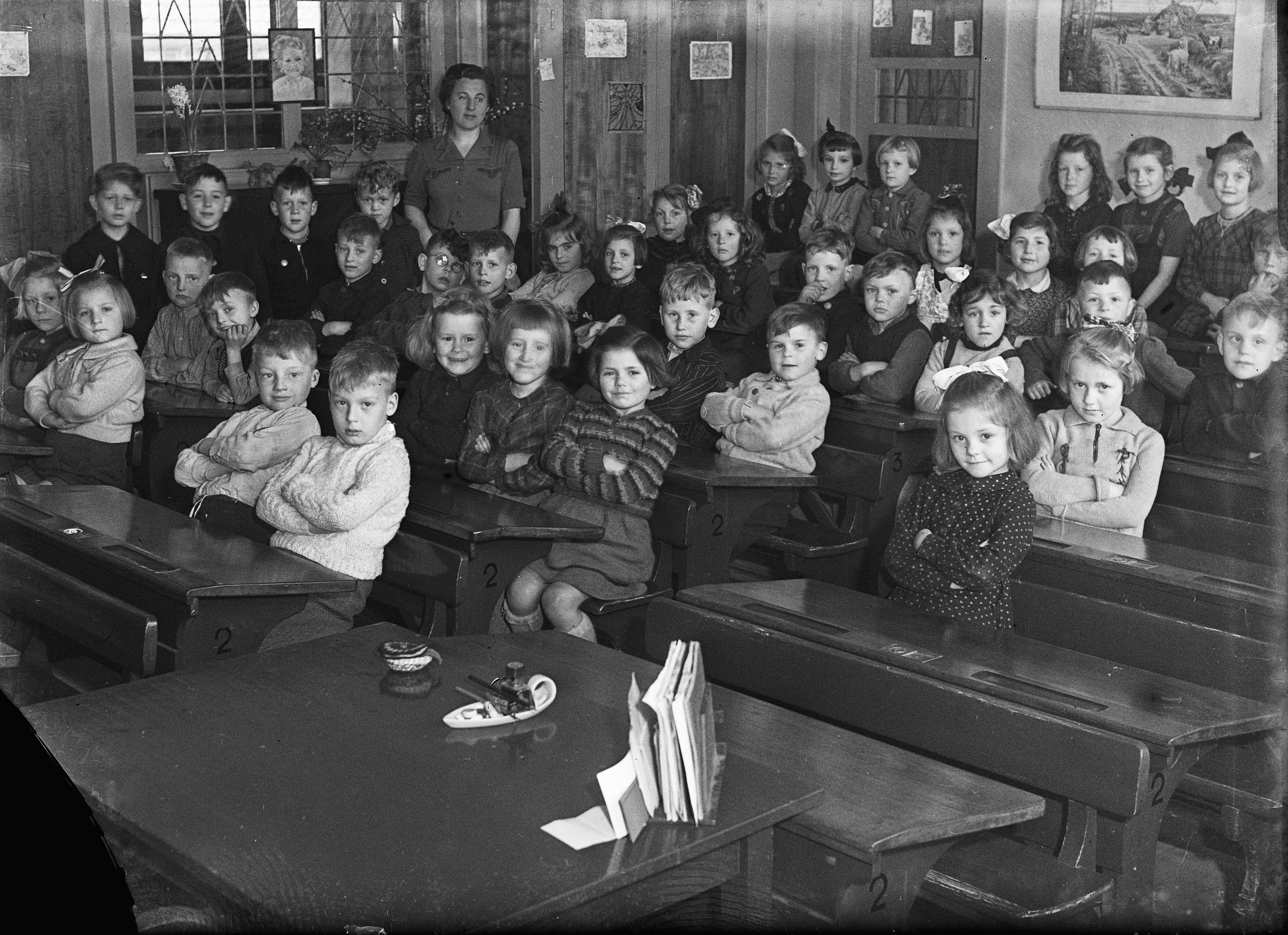 Collectie / Archief : Fotocollectie Anefo Reportage / Serie : [ onbekend ] Beschrijving : Openbare Lagere School Amersfoort Datum : 25 maart 1946 Locatie : Amersfoort Fotograaf : Sagers, Harry / Anefo Auteursrechthebbende : Nationaal Archief Materiaalsoort : Glasnegatief Nummer archiefinventaris : bekijk toegang 2.24.01.09 Bestanddeelnummer : 901-5964